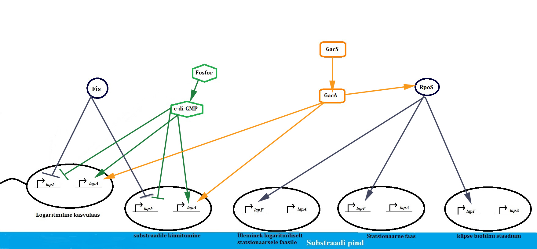 LapA ja lapF hulka rakus reguleerivad c-di-GMP, GacS/GacA kahekomponendiline regulatsioonisüsteem, statsionaarse faasi sigma faktor RpoS ja globaalne regulaator Fis. LapA ja lapF hulka reguleeritakse biofilmi moodustamise etappidel erinevalt.